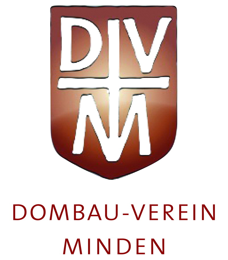 Logo des Dombau-Vereins Minden e.V. wie der Förderverein es seit 2017 führt.